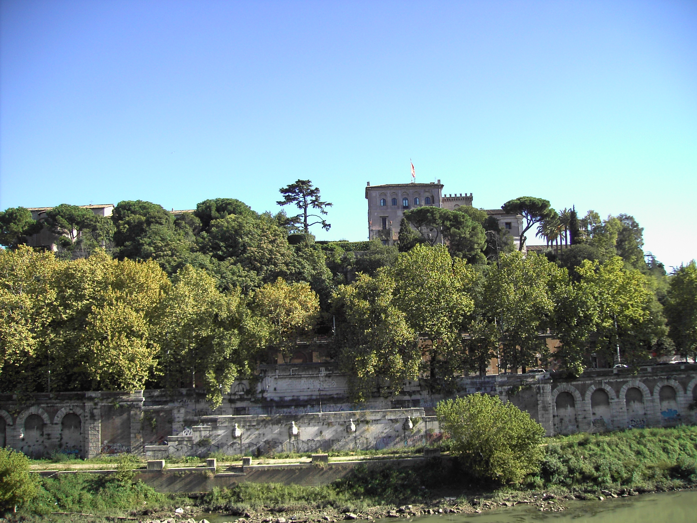 Roma , Aventino: villa dei Cavalieri di Malta. Sotto, la cosiddetta Ripa Graeca.